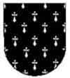 Contraarmiños (forro heráldico)